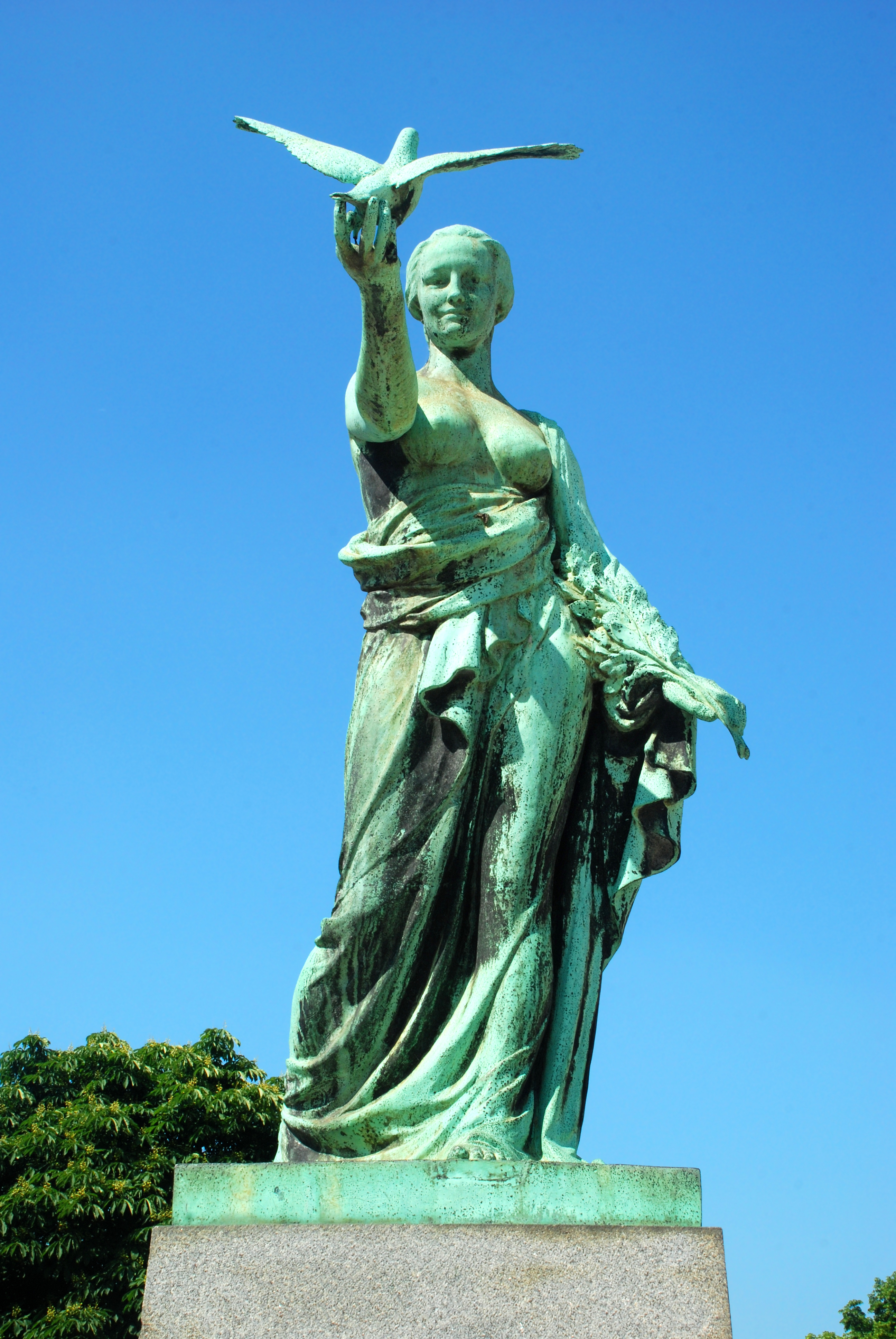 Belgique - Bruxelles - Monument au Pigeon-Soldat (architecte Georges Hano - sculpteur Victor Voets)